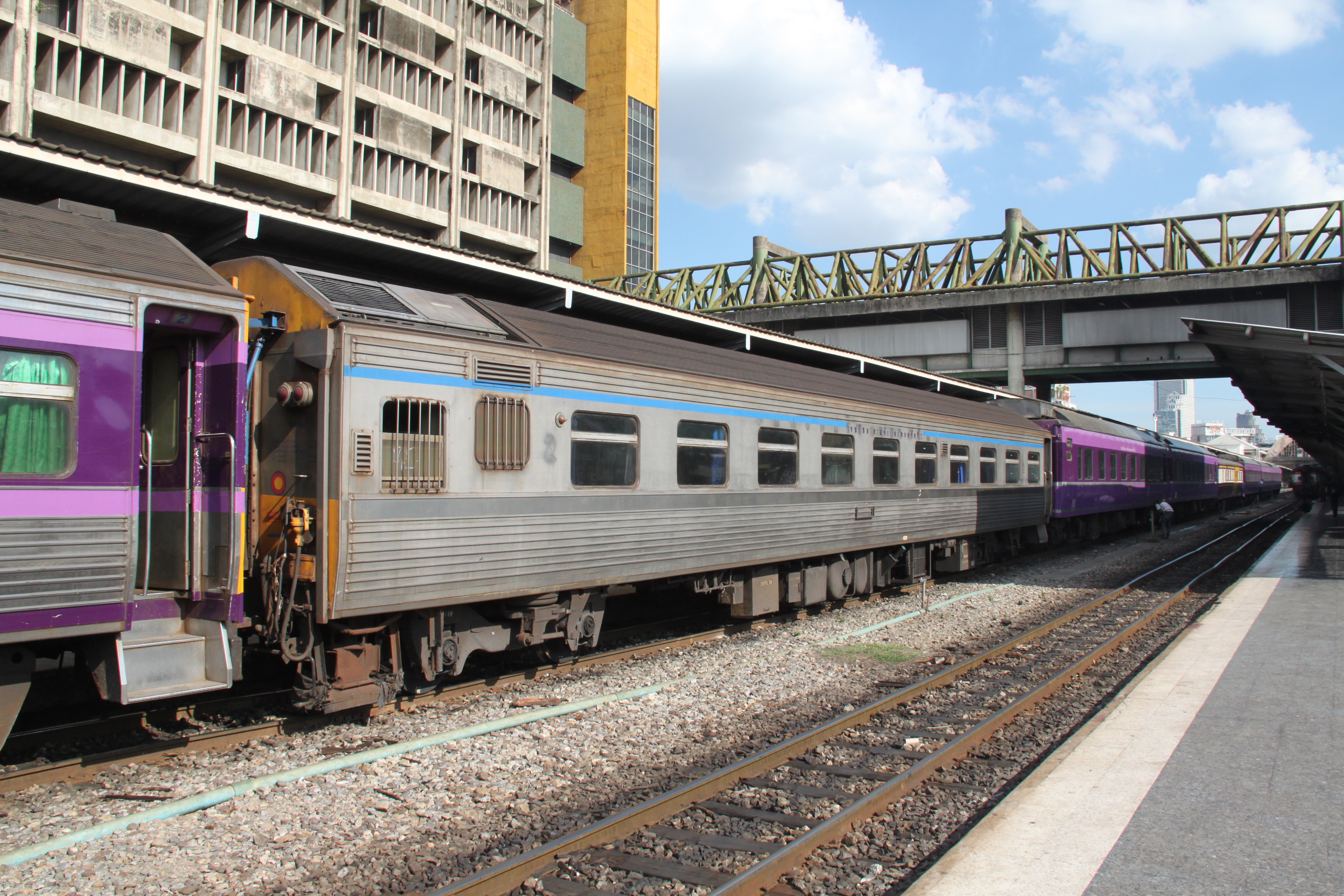 Carriage of Thailand State Railways